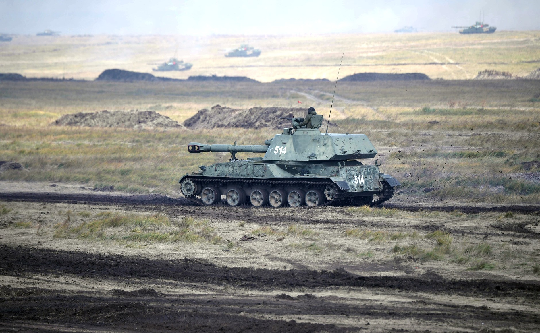 Основной этап манёвров «Восток-2018» на полигоне Цугол в Забайкальском крае.